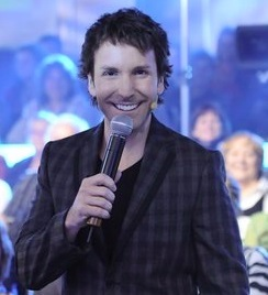 Éric Salvail anime l'émission Fidèles au poste!